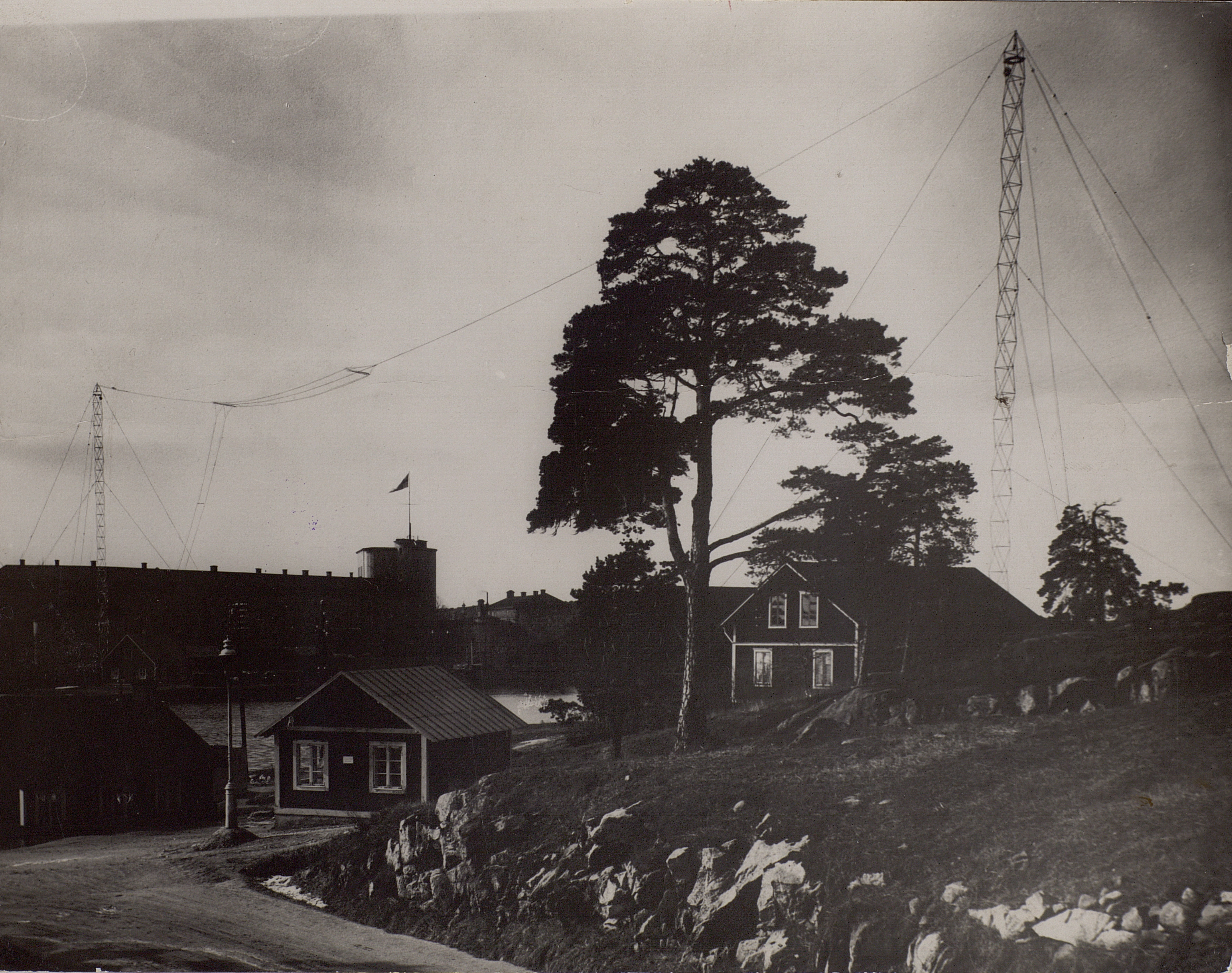 Vaxholm radio, exteriör med radiomaster sett från Rindö. Vaxholms kuststation ersattes sedemera med Stockholms kuststatiön vid Stavsnäs. Bild från 1930.